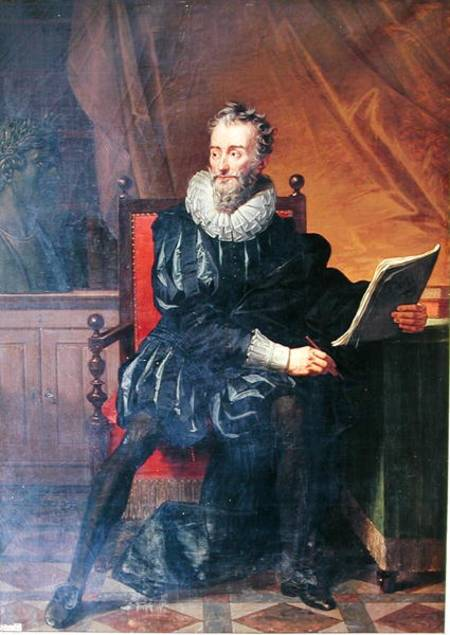 Robert Lefevre "Portrait of Francois de Malherbe (1555-1628)"